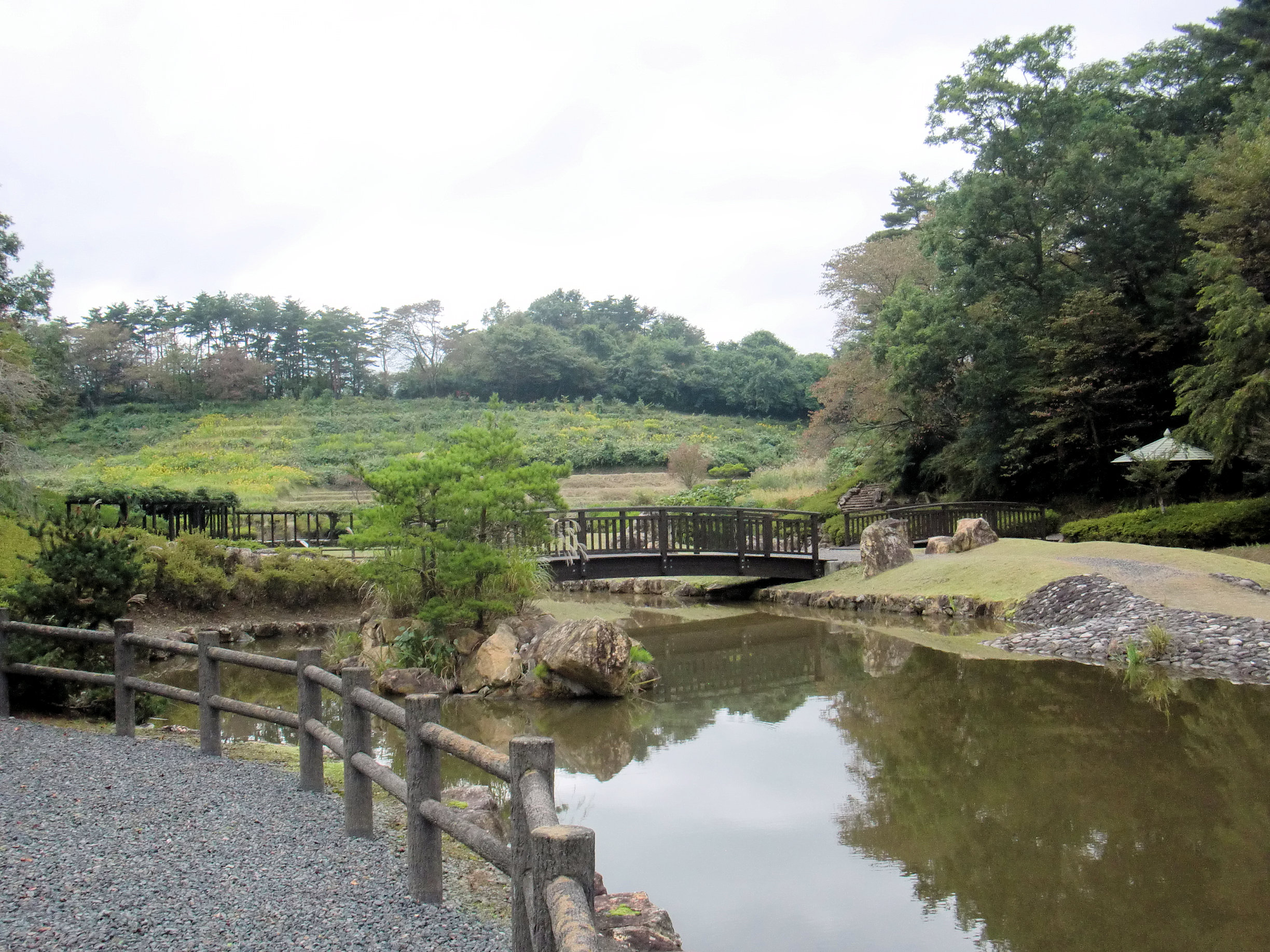 山ノ井農村公園